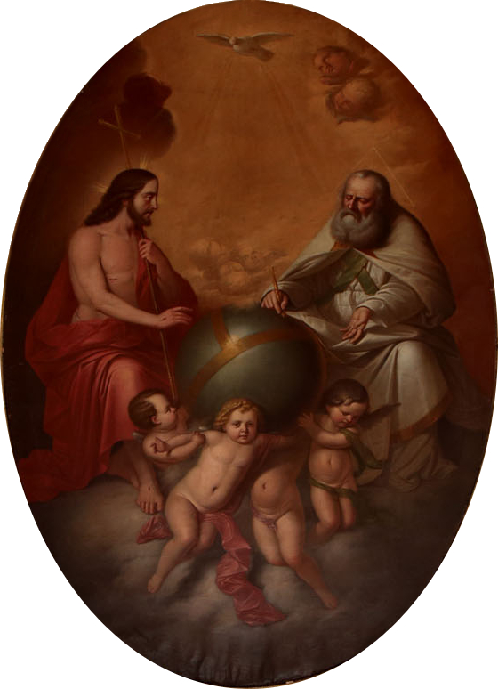 Lienzo de la Santísima Trinidad, realizado por el pintor José Saló Junquet (1810-1877). Se encuentra en la capilla de la Santísima Trinidad de la Mezquita-catedral de Córdoba, (España).